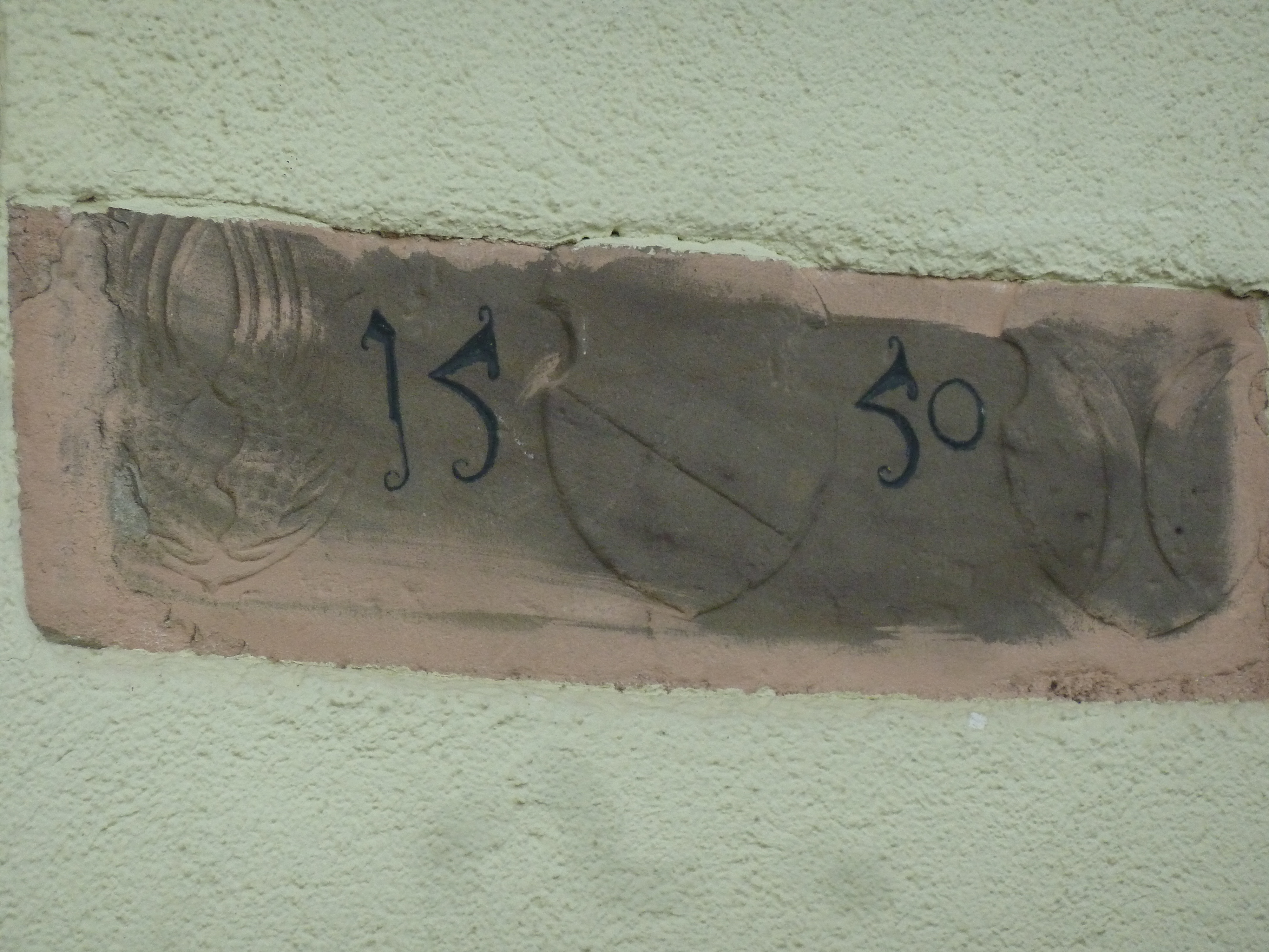 Wappenstein von 1550, Wappenschilde der "Ganerben", also der Freiherren von Münster, von Fulbach, von Stein, eingemauert am Eingang zum Keller des ehemaligen Unteren Wirtshauses, Sandstein.